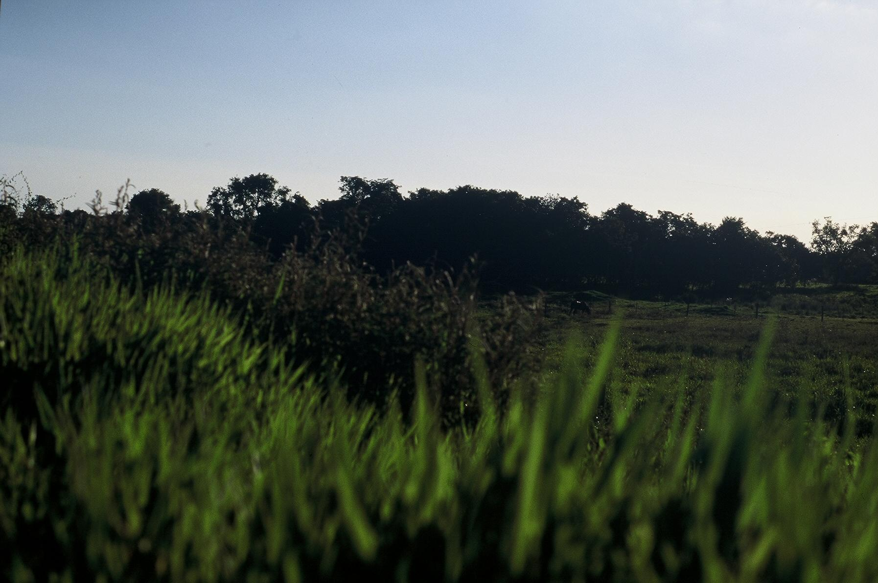 Paisagem da cidade de Tres Lagoas, Mato Grosso do Sul, Brasil.